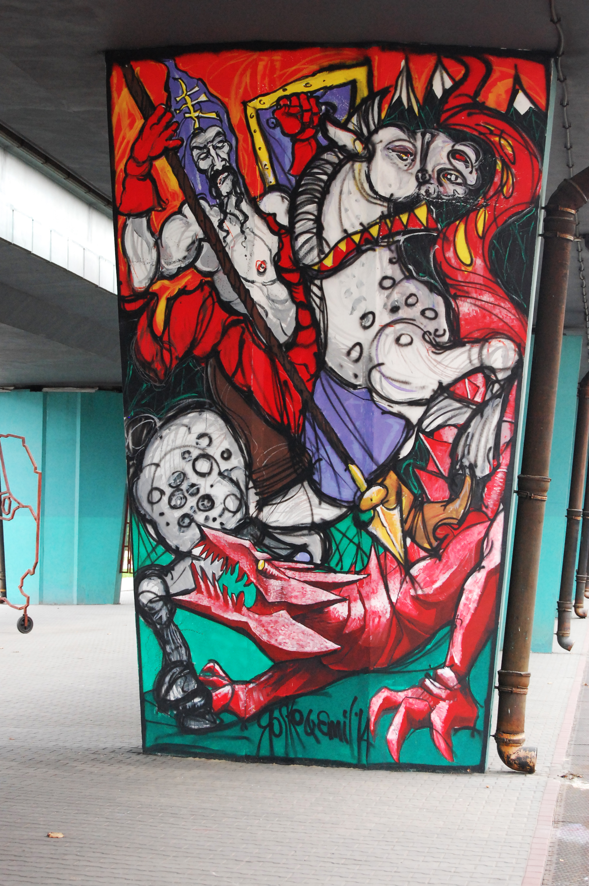 Rafała Roskowiński - materiały ze zbiorów autora.